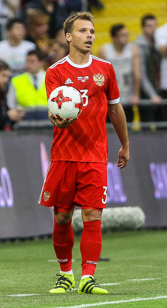 Россия - Чили